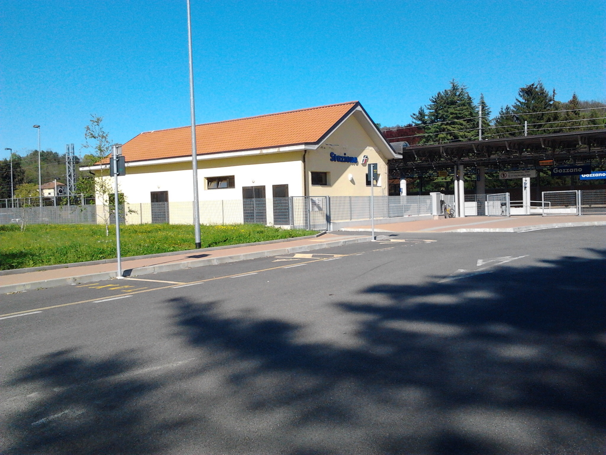 Stazione ferroviaria di Gozzano, il fabbricato viaggiatori.